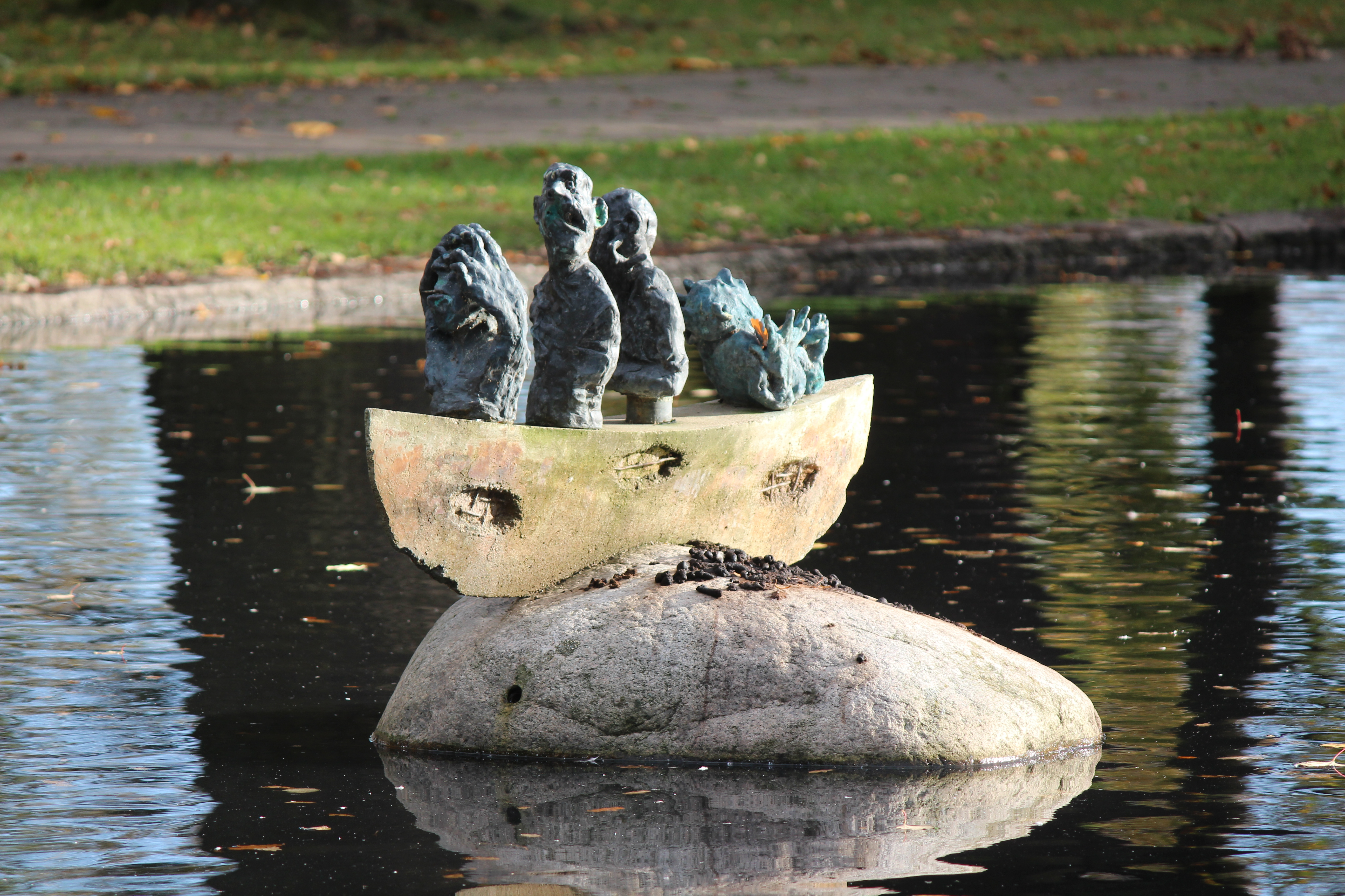 Vasaparken i Västerås: skulpturen 'Dårarnas båt' av Sture Collin 1990 enligt